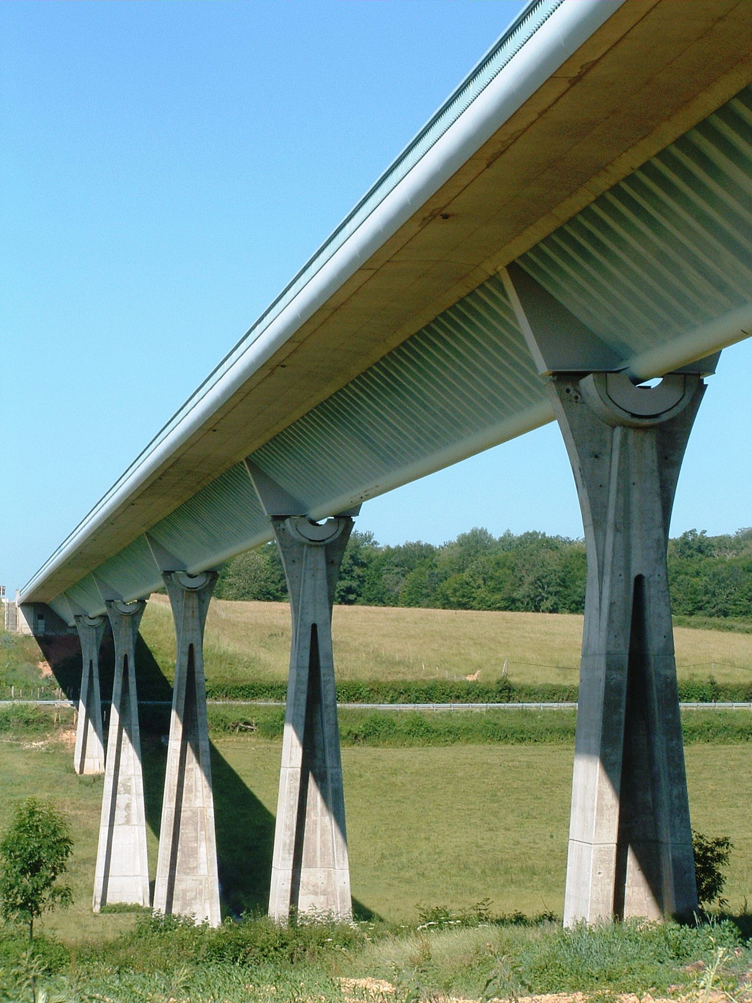 Charolles - RN79 - Viaduc de Maupré